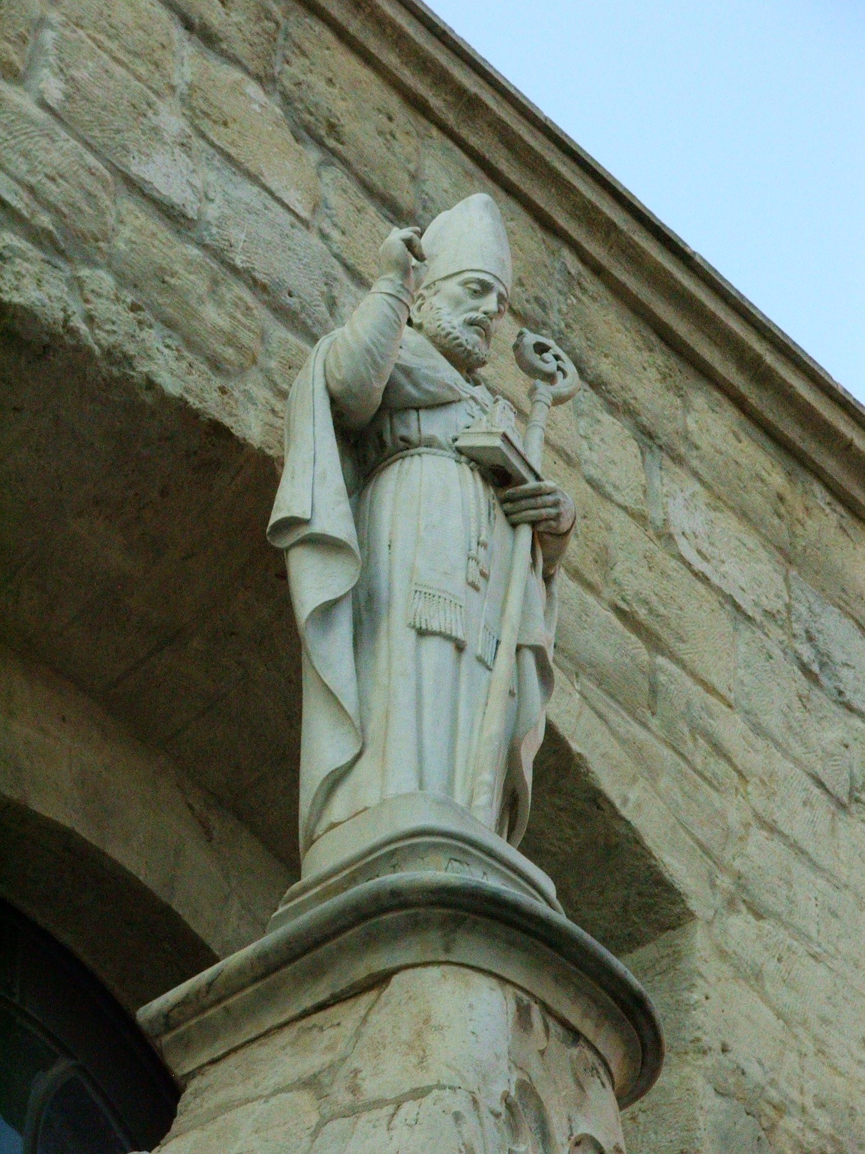 Statua di San Riccardo a lato della cattedrale di Andria